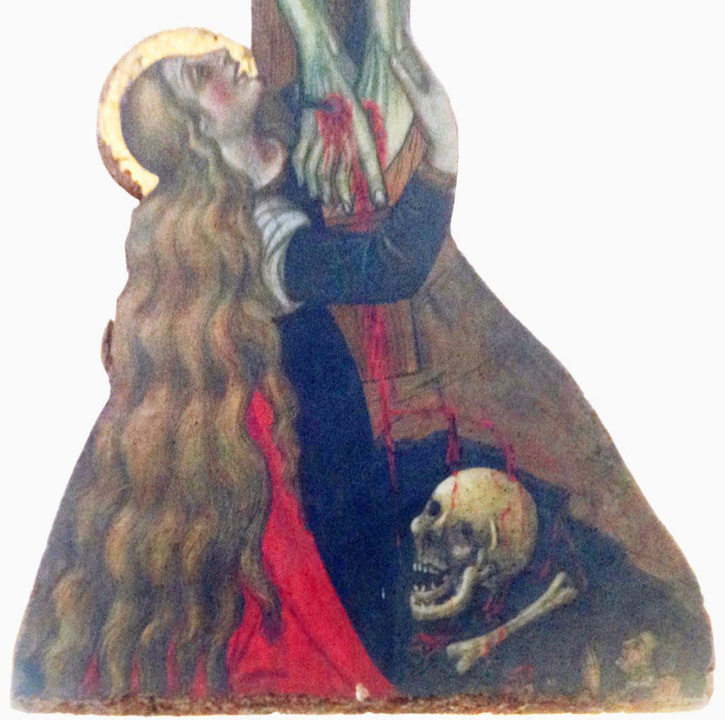 Dettaglio con il Golgota, Maria Maddalena e il donatore.